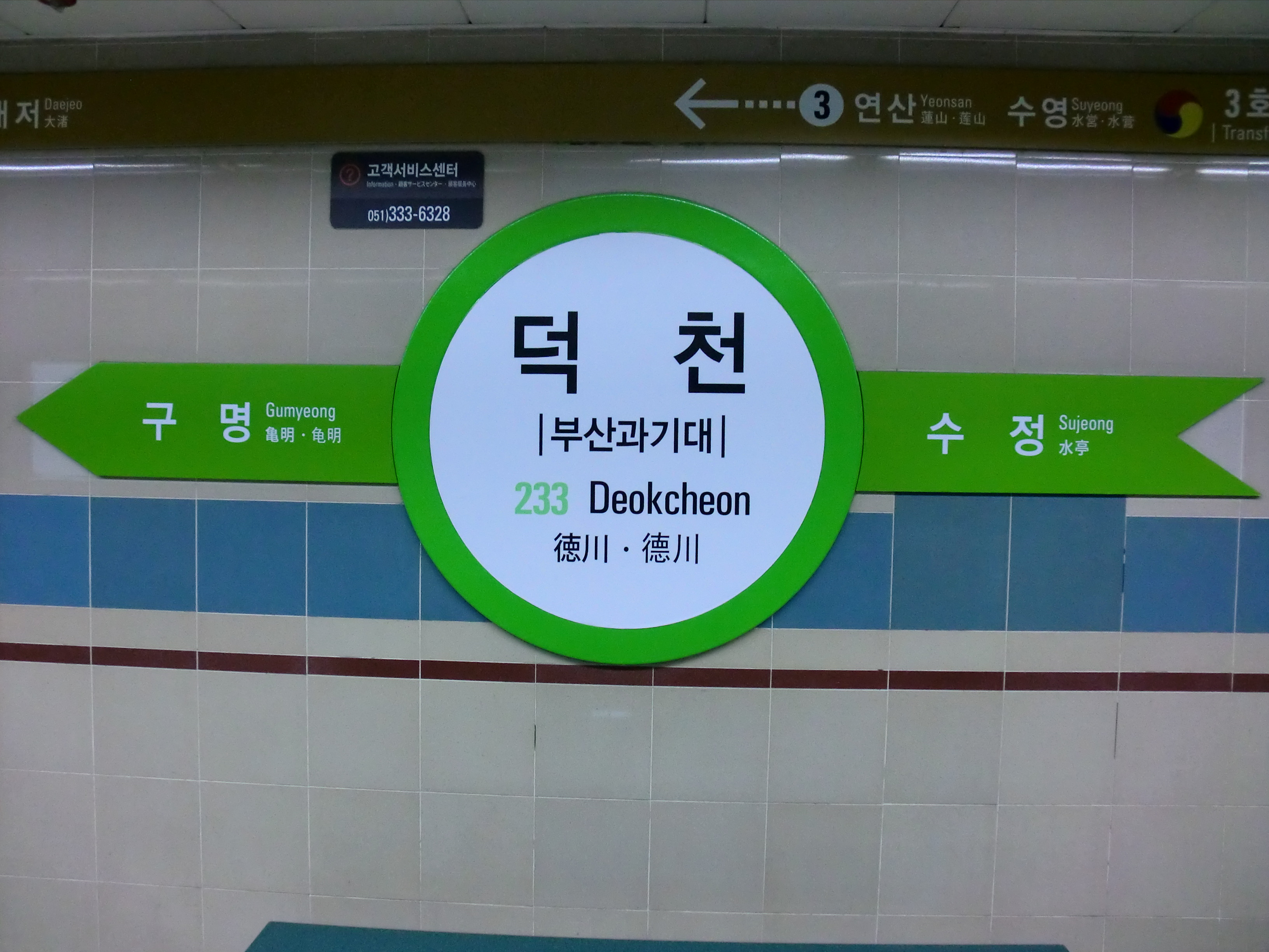 부산도시철도 2호선 덕천역의 역명판